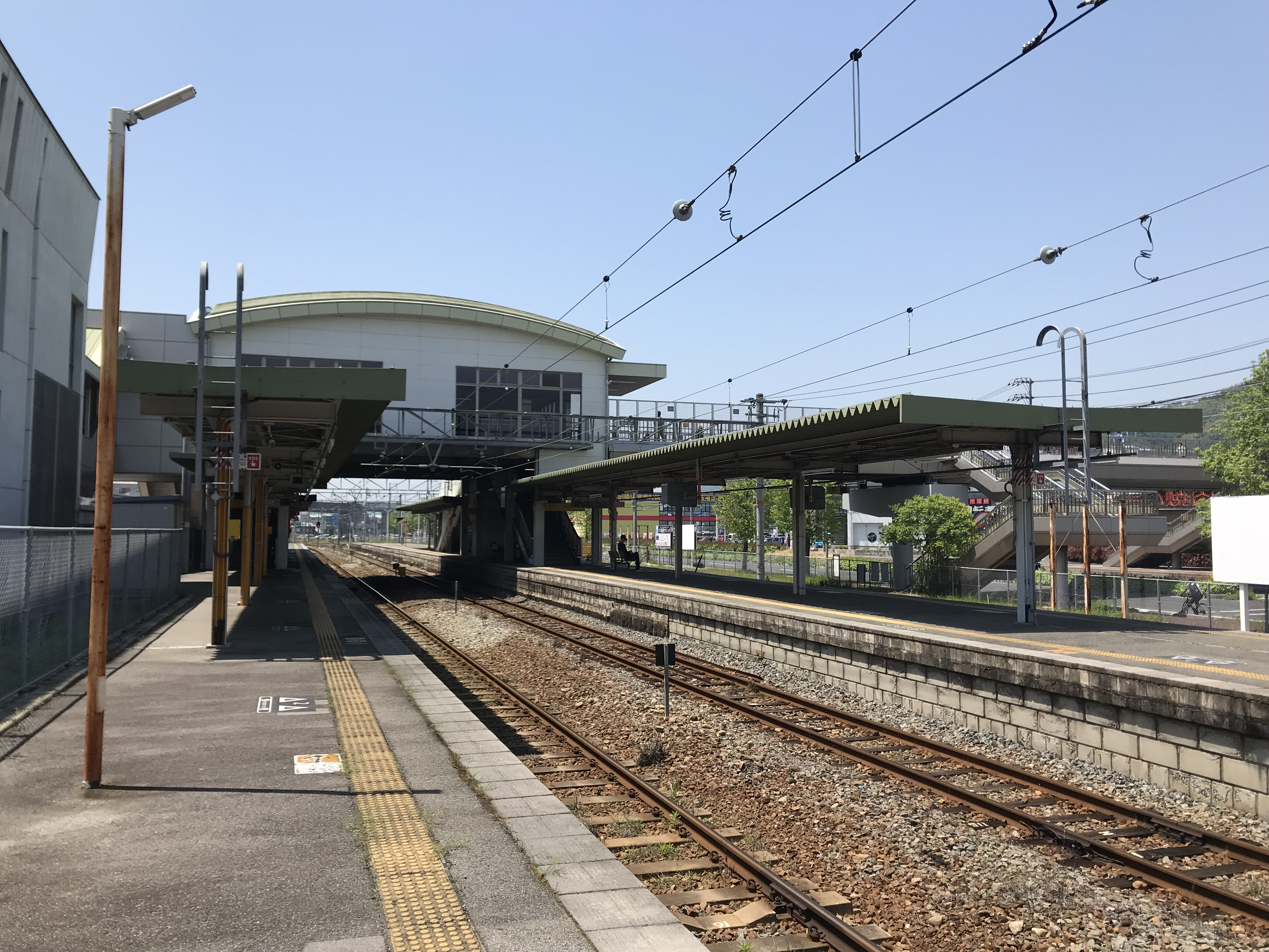 坂駅のホーム(奥は水尻方面)